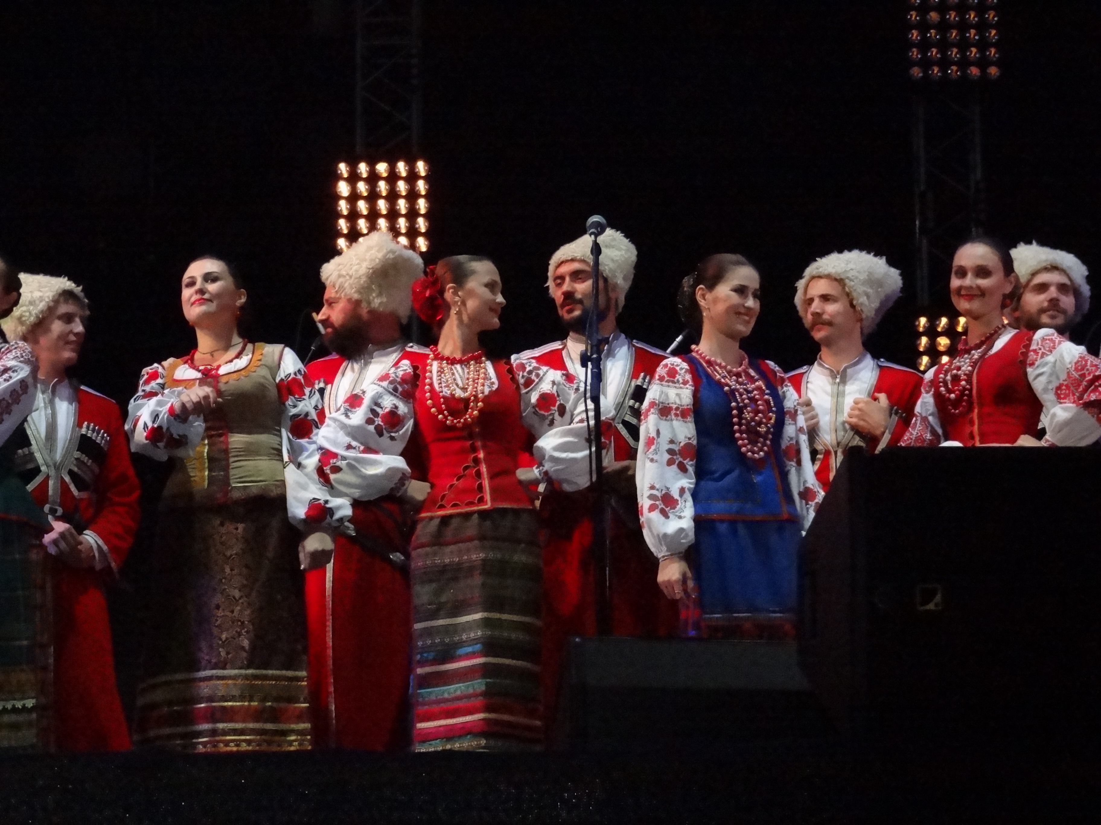 Концерт для участников X Международного инвестиционного форума в Сочи. 2011 год.